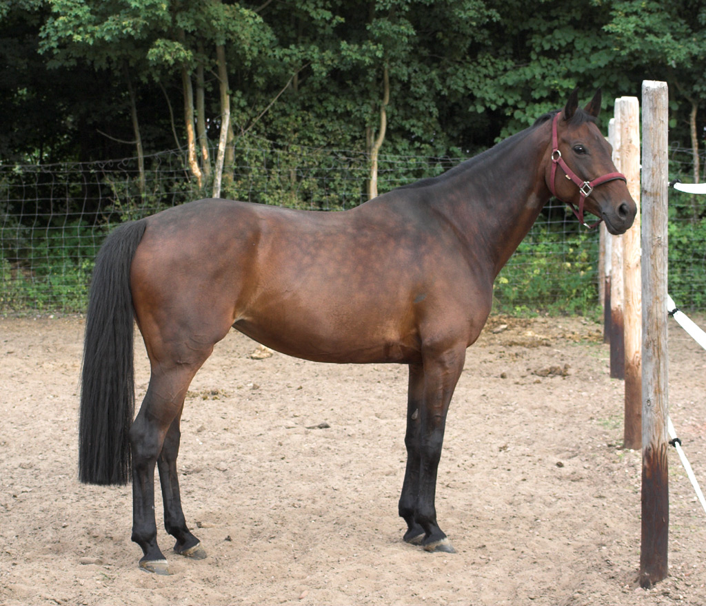 10jährige Oldenburger Stute